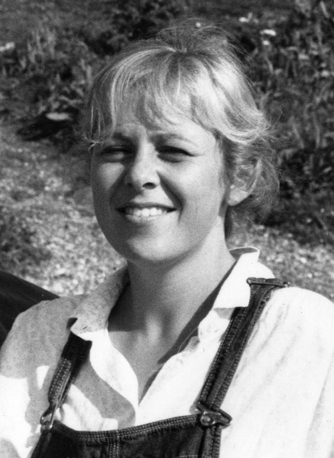 William Engseth, Roger Ingebrigtsen og Turid Birkeland